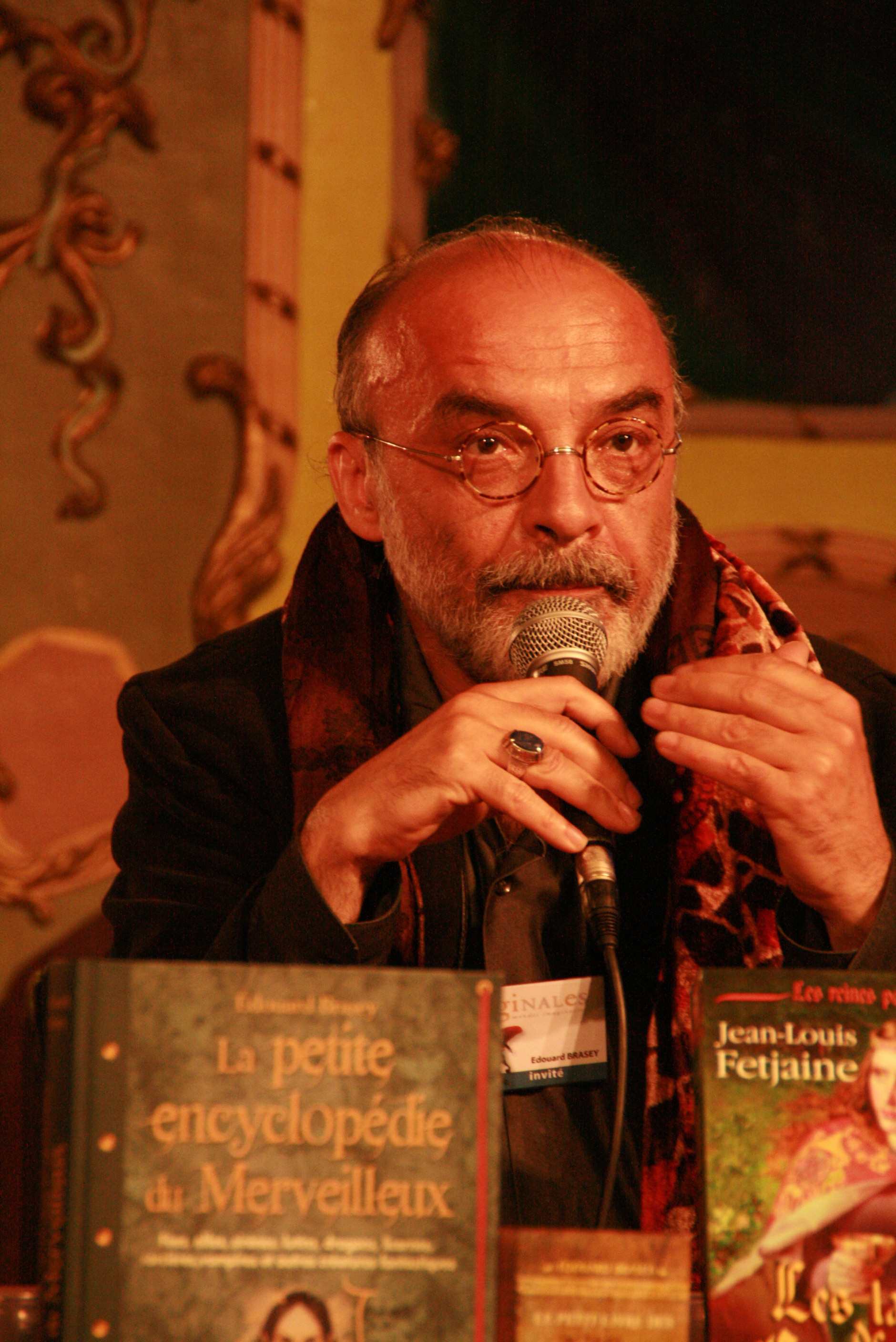 Edouard Brasey aux Imaginales